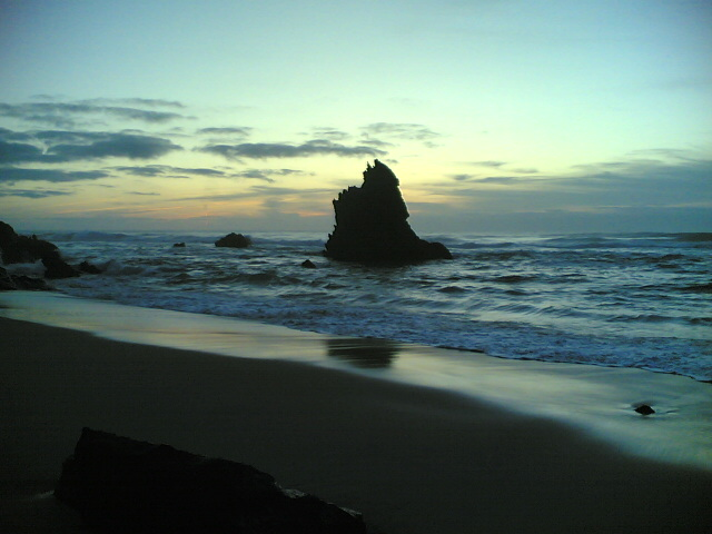 Praia da adraga, Sintra, Portugal